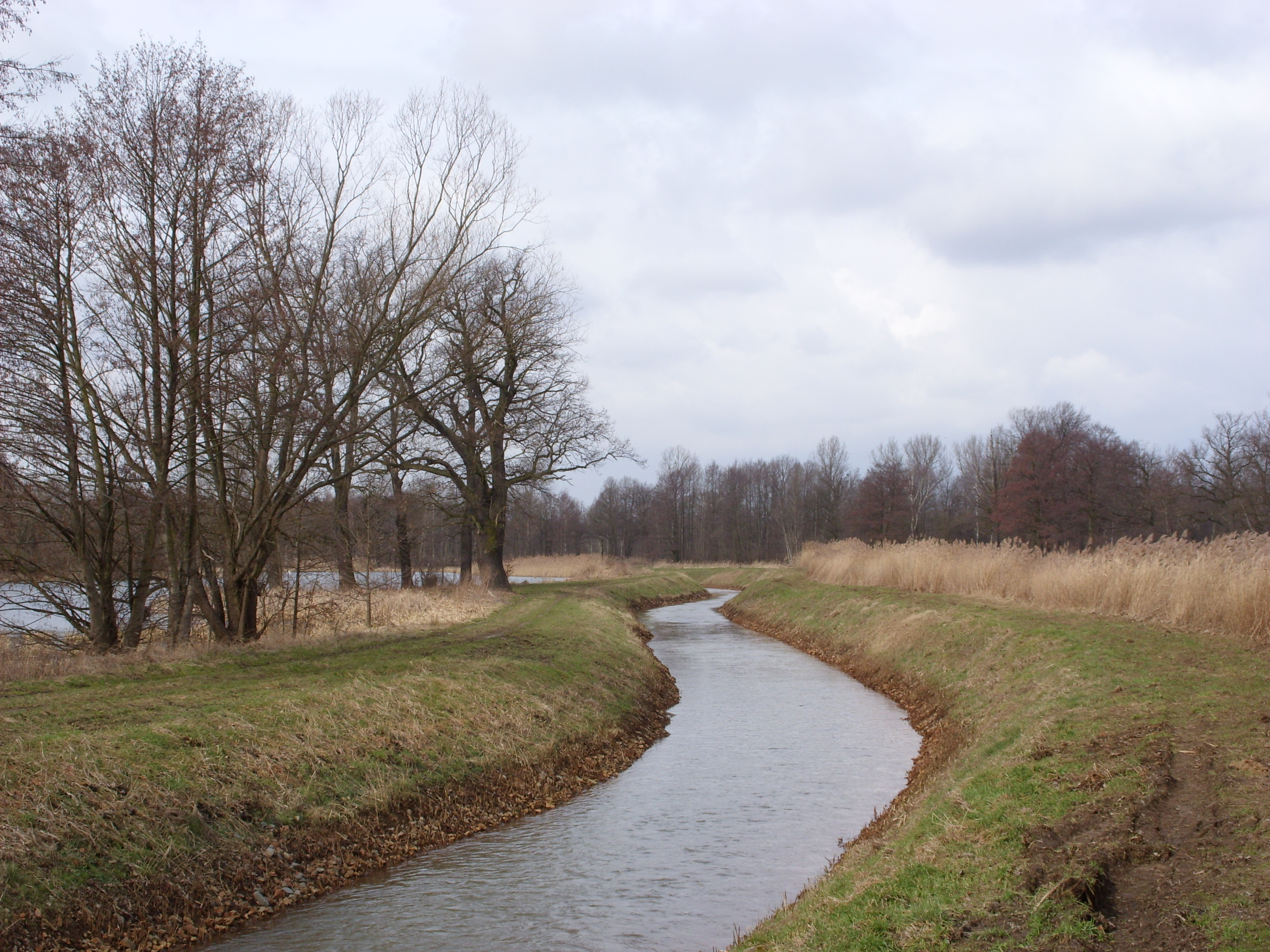 Die Kleine Spree bei Lippitsch, Gemeinde Radibor, Landkreis Bautzen. Hornjoserbsce: Sprjewica blisko Lipiča, gmejna Radwor, wokrjes Budyšin.